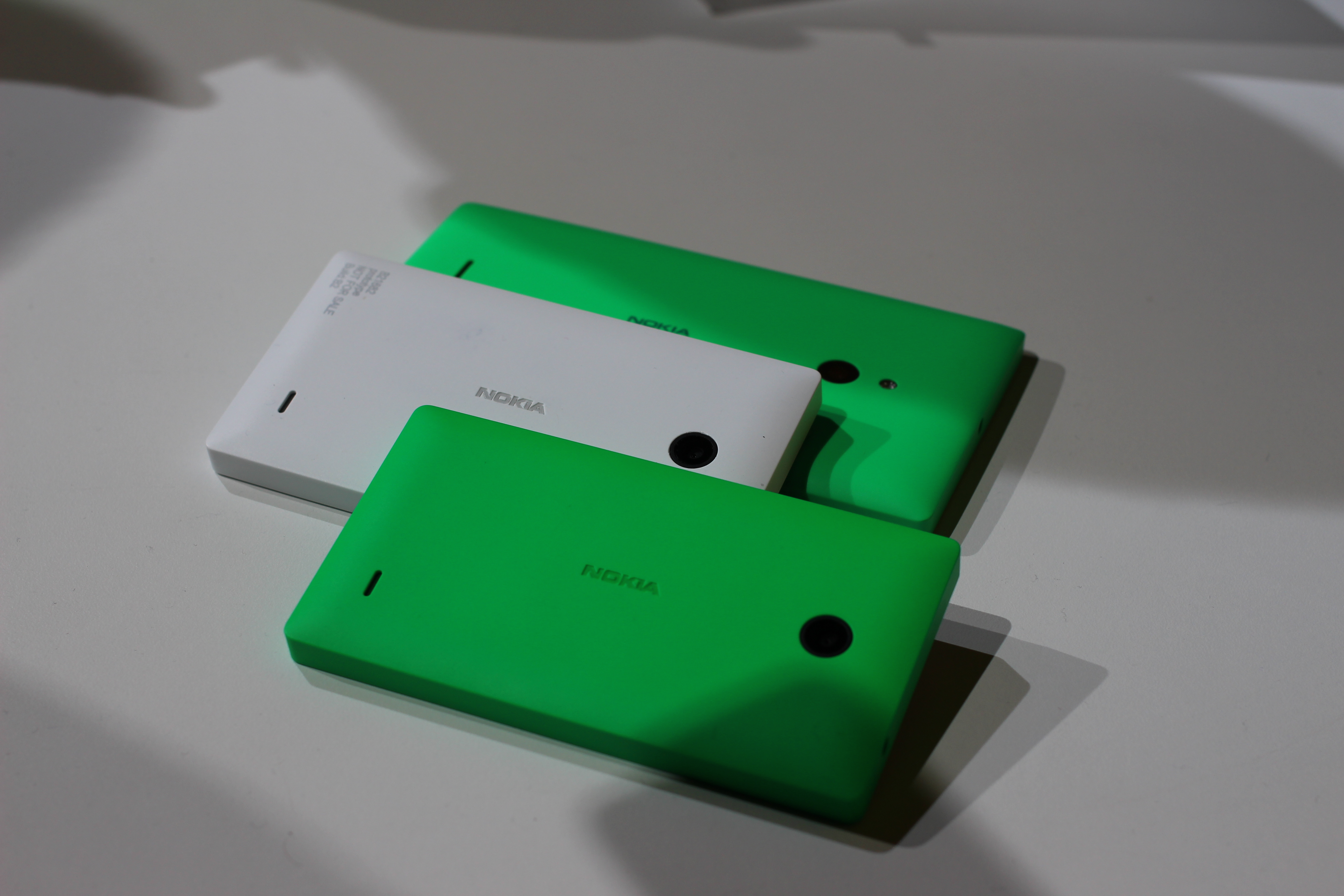 Nokia X and Nokia XL